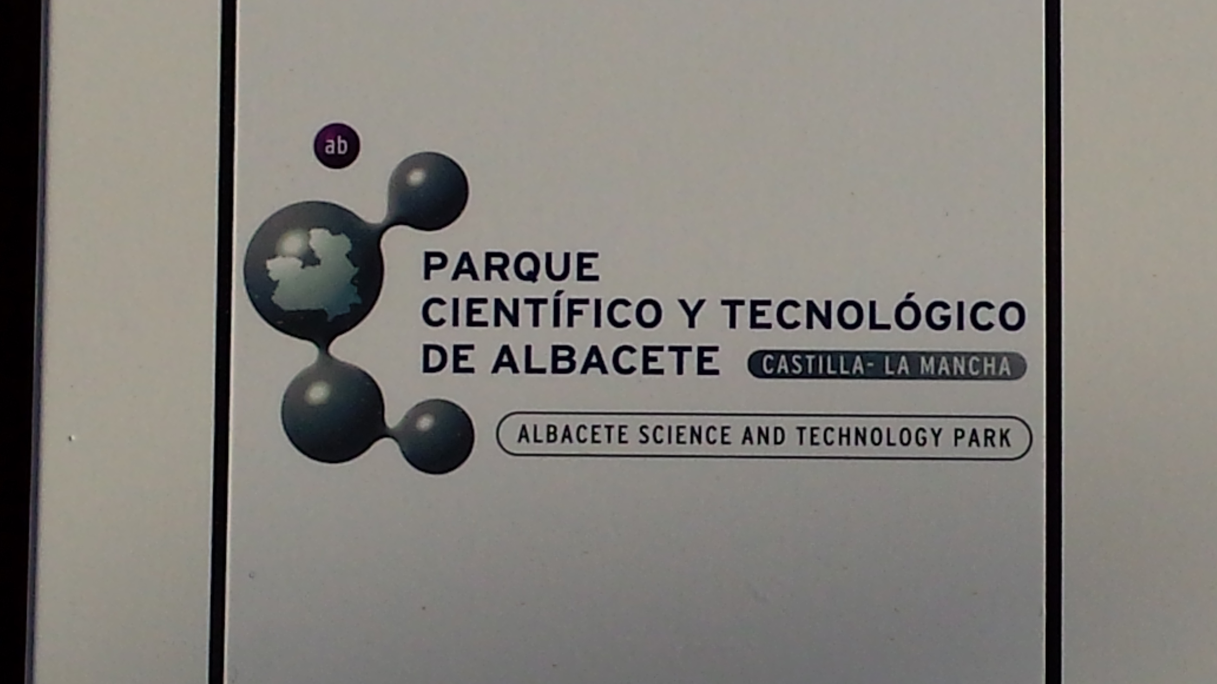 Logo del PCYTA situado en una señal.